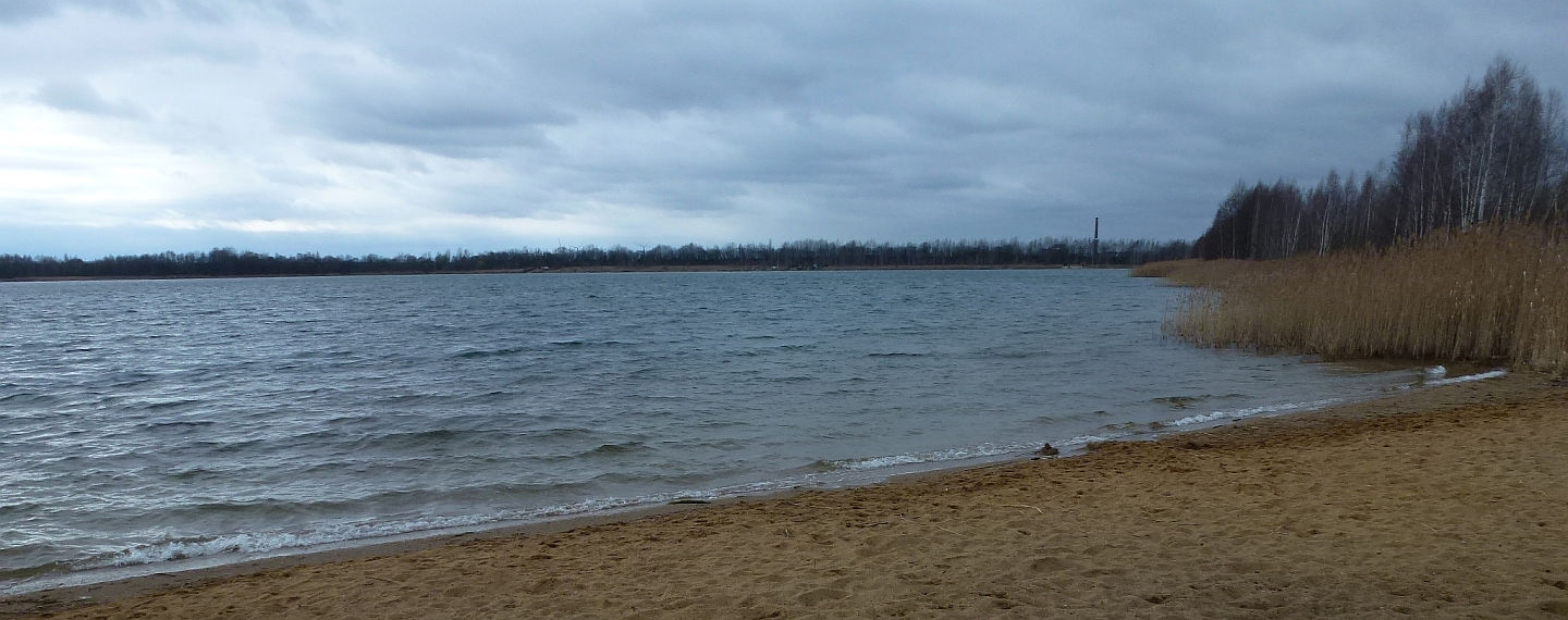 Harthsee bei Nenkersdorf, im Hintergrund der Schornstein von Neukirchen